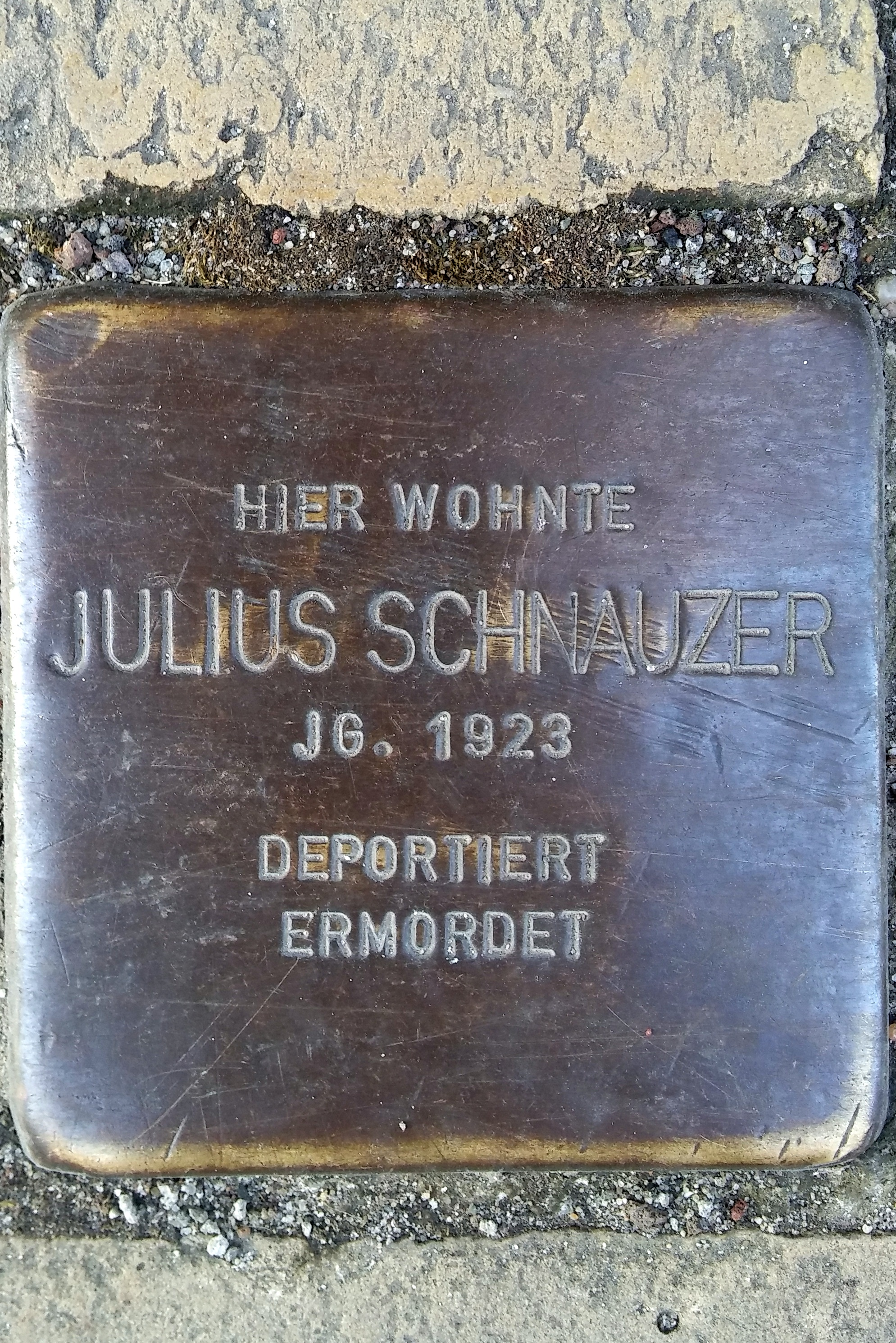 Stralsund, Frankenstraße 51, Stolperstein Julius Schnauzer